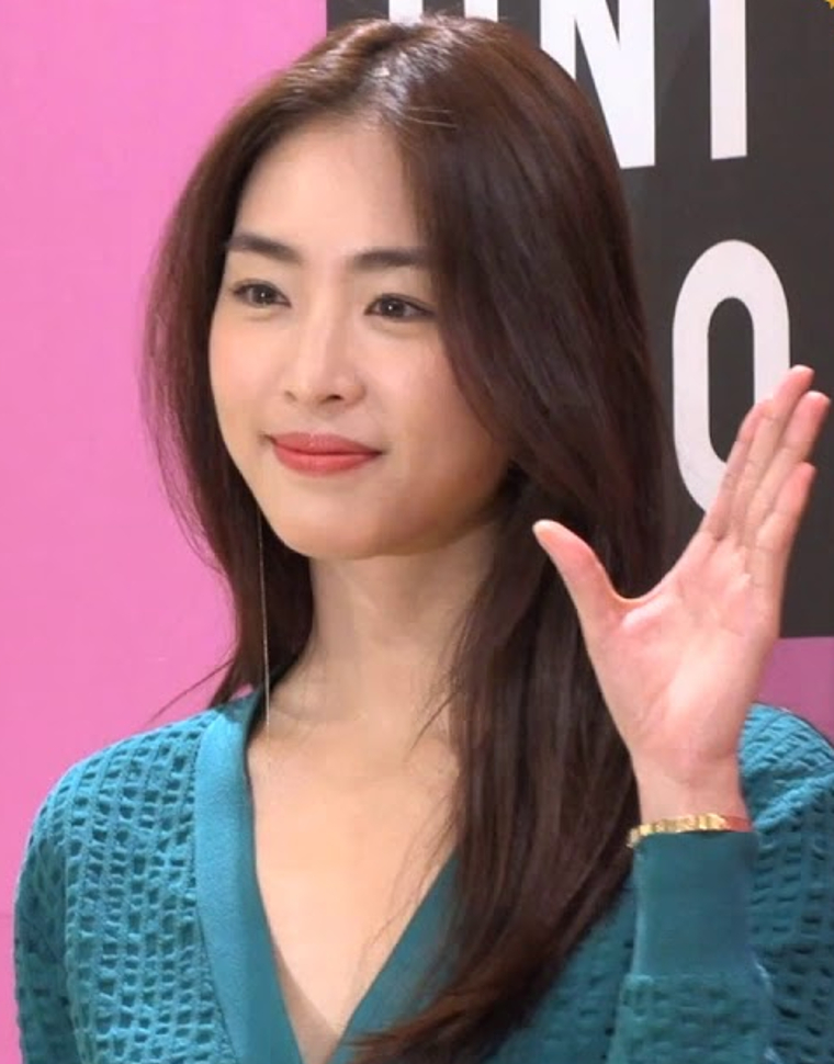 이연희 Lee Yeon Hee 탄성 자아내는 미모 @ 유니클로U 2019SS 시즌 컬렉션 런칭.